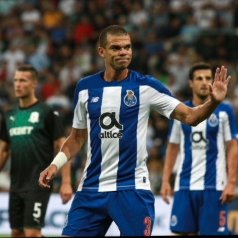 Pepe con il Porto durante una partita di qualificazione alla Champions League